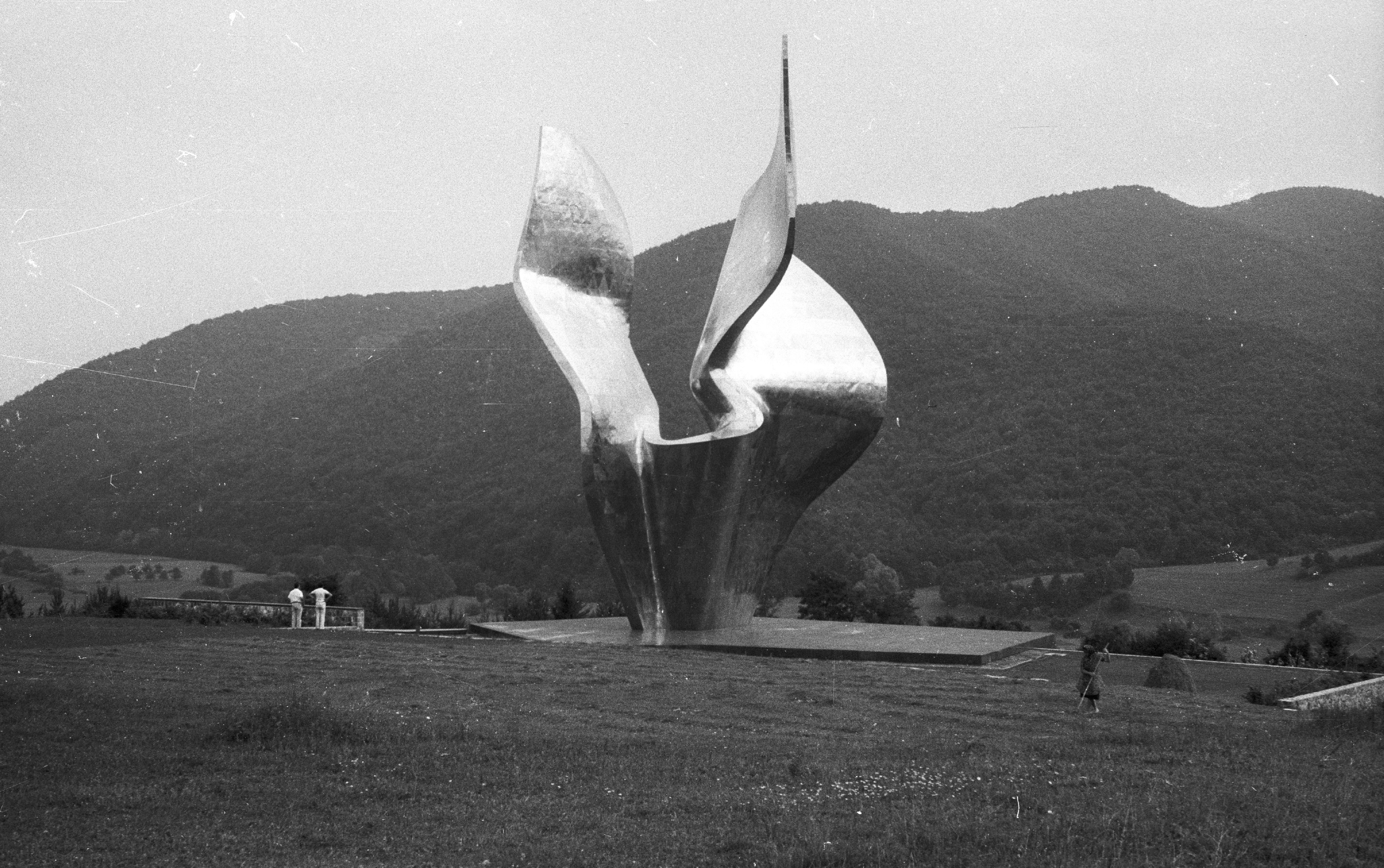 háborús emlékmű (Vojin Bakic 1968.). Location: Croatia, Karlovac County, Kamanje Tags: Yugoslavia Title: háborús emlékmű (Vojin Bakic 1968.).